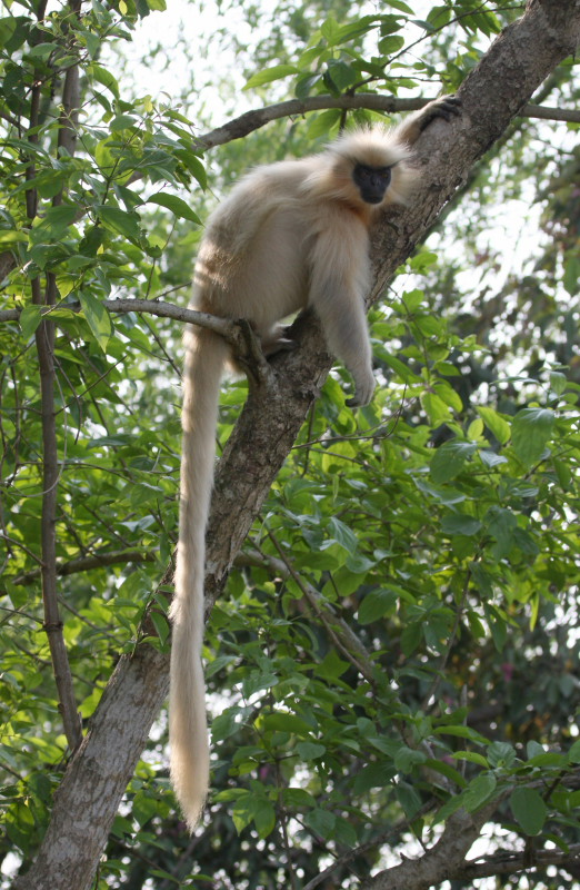 golden langur 02